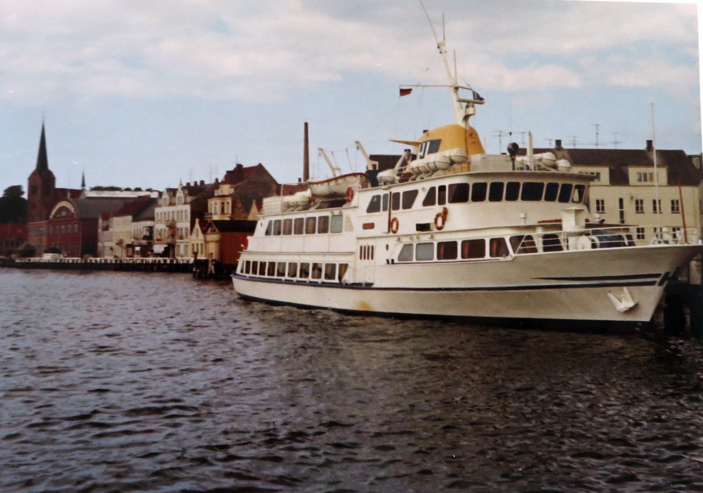 Schiff